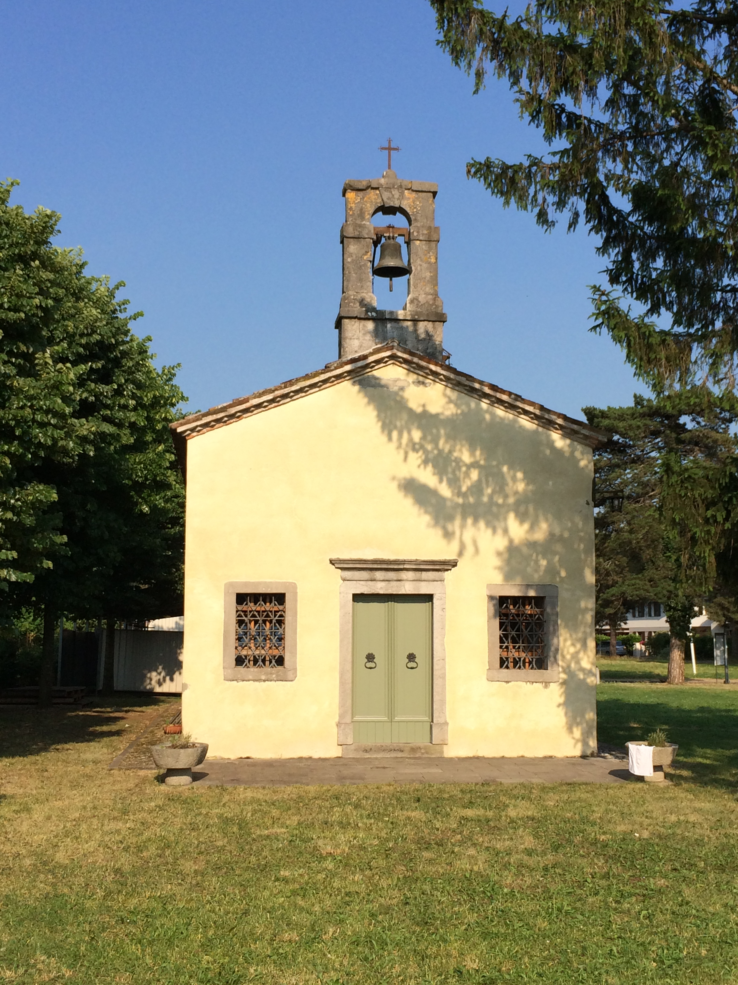 Moimacco